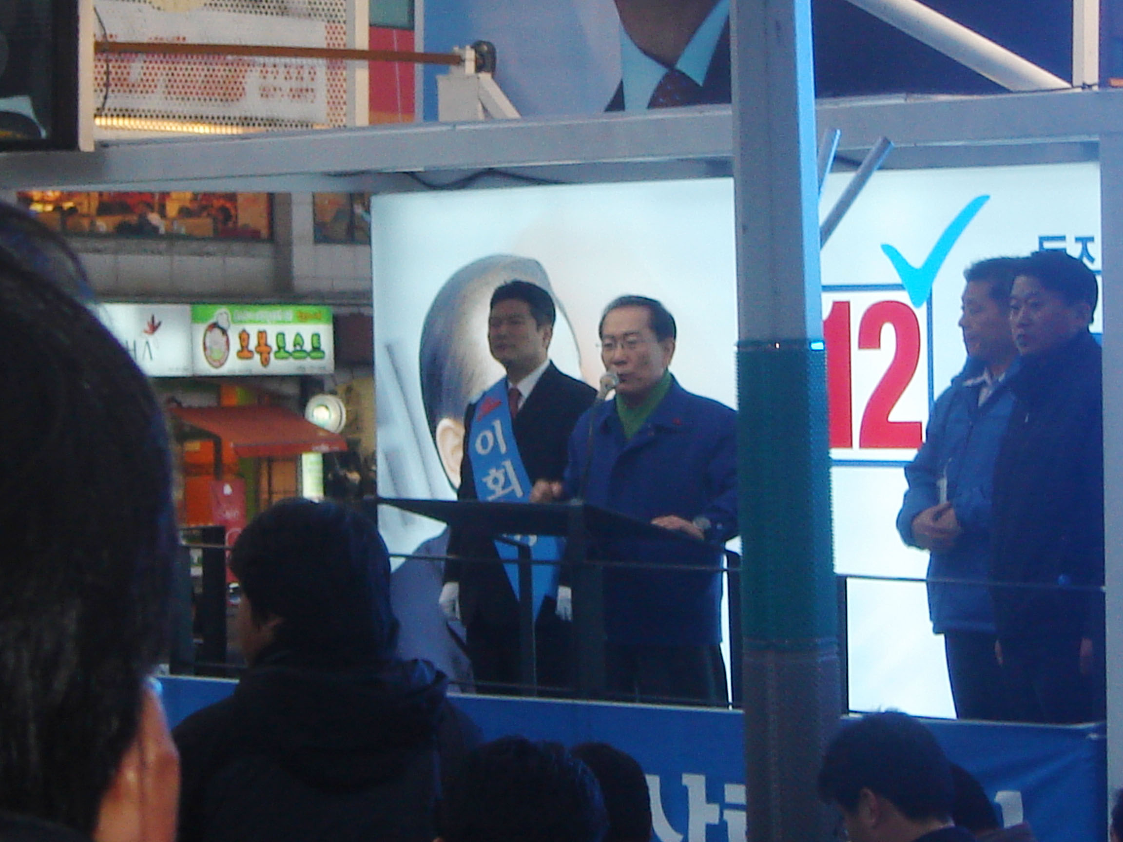 Lee Hoi Chang